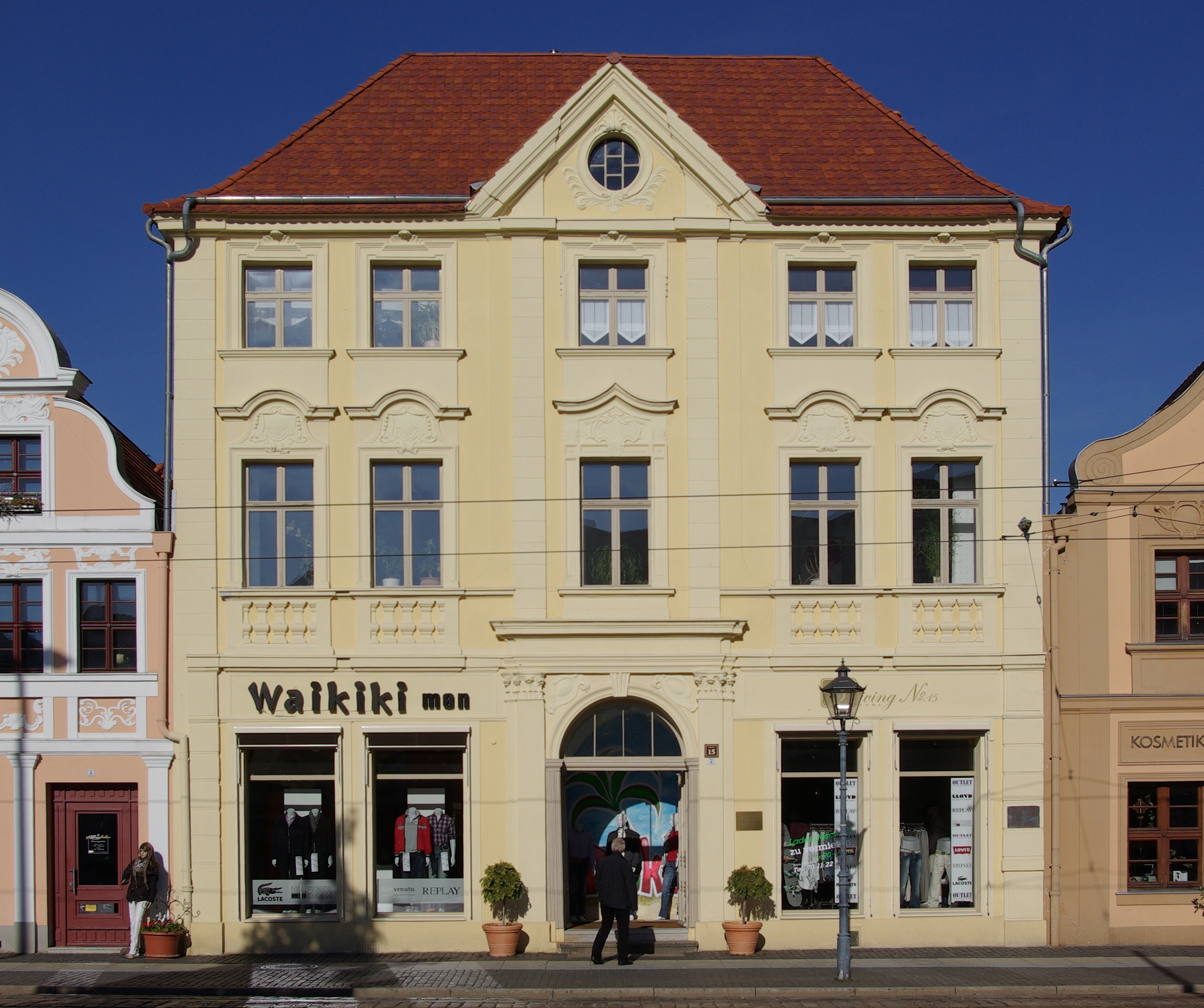 Cottbus in Brandenburg. Das Haus Altmarkt 15 steht unter Denkmalschutz.